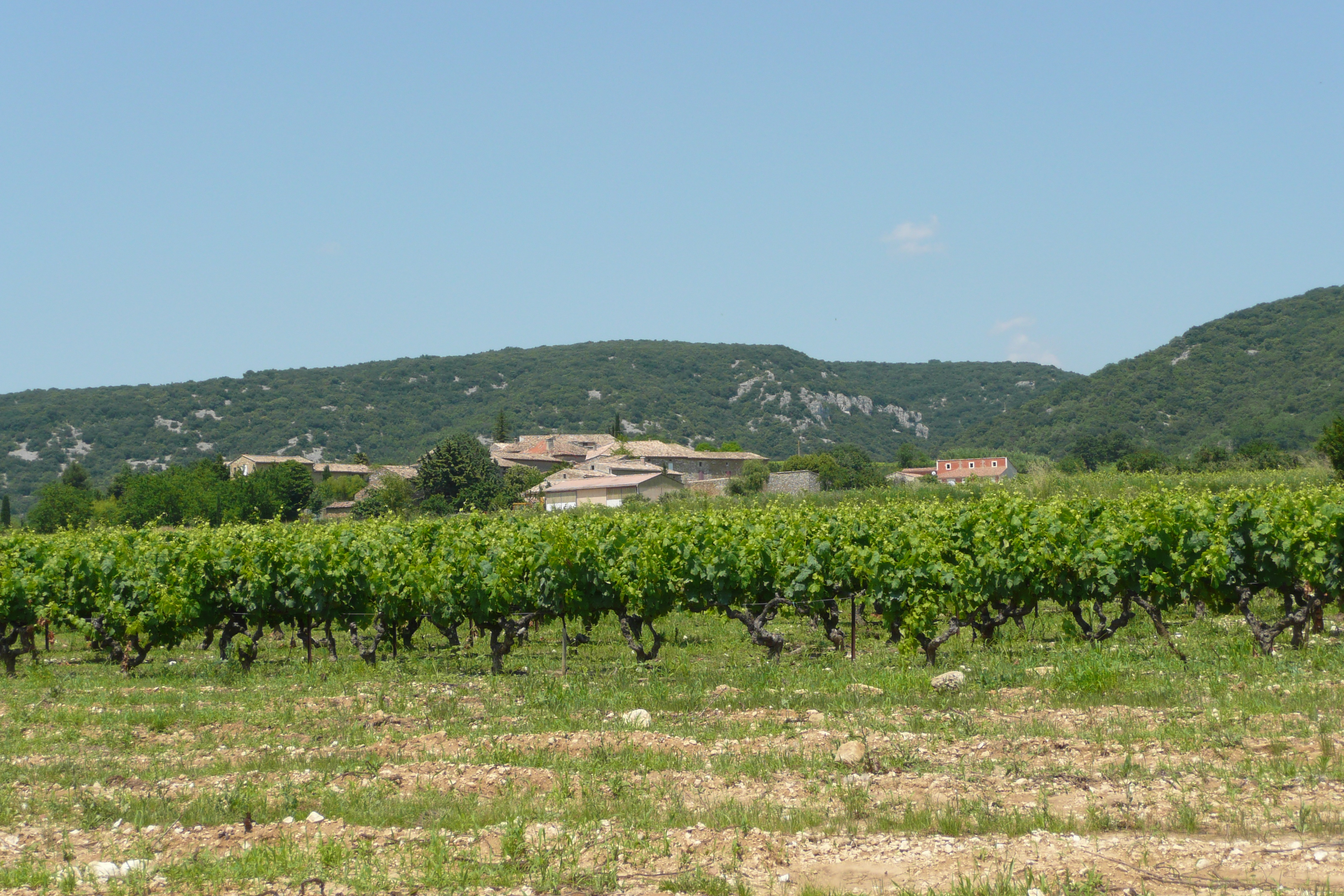 Paysage près de Saint-André-de-Roquepertuis.